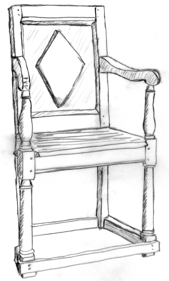 Siège "caquetoire" style Louis XIII (schéma personnel)